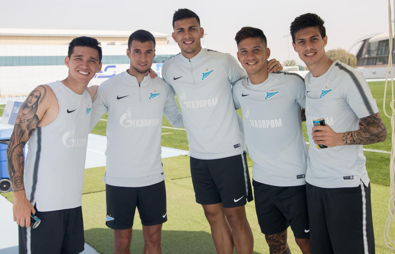 25.01.2018. Объединенные Арабские Эмираты, Дубай. «Газпром»-тренировочные сборы в Дубае: 25 января, утренняя тренировка.